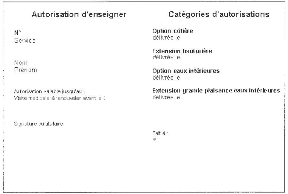 Autorisations d’enseigner la conduire des bateaux de plaisance à moteur